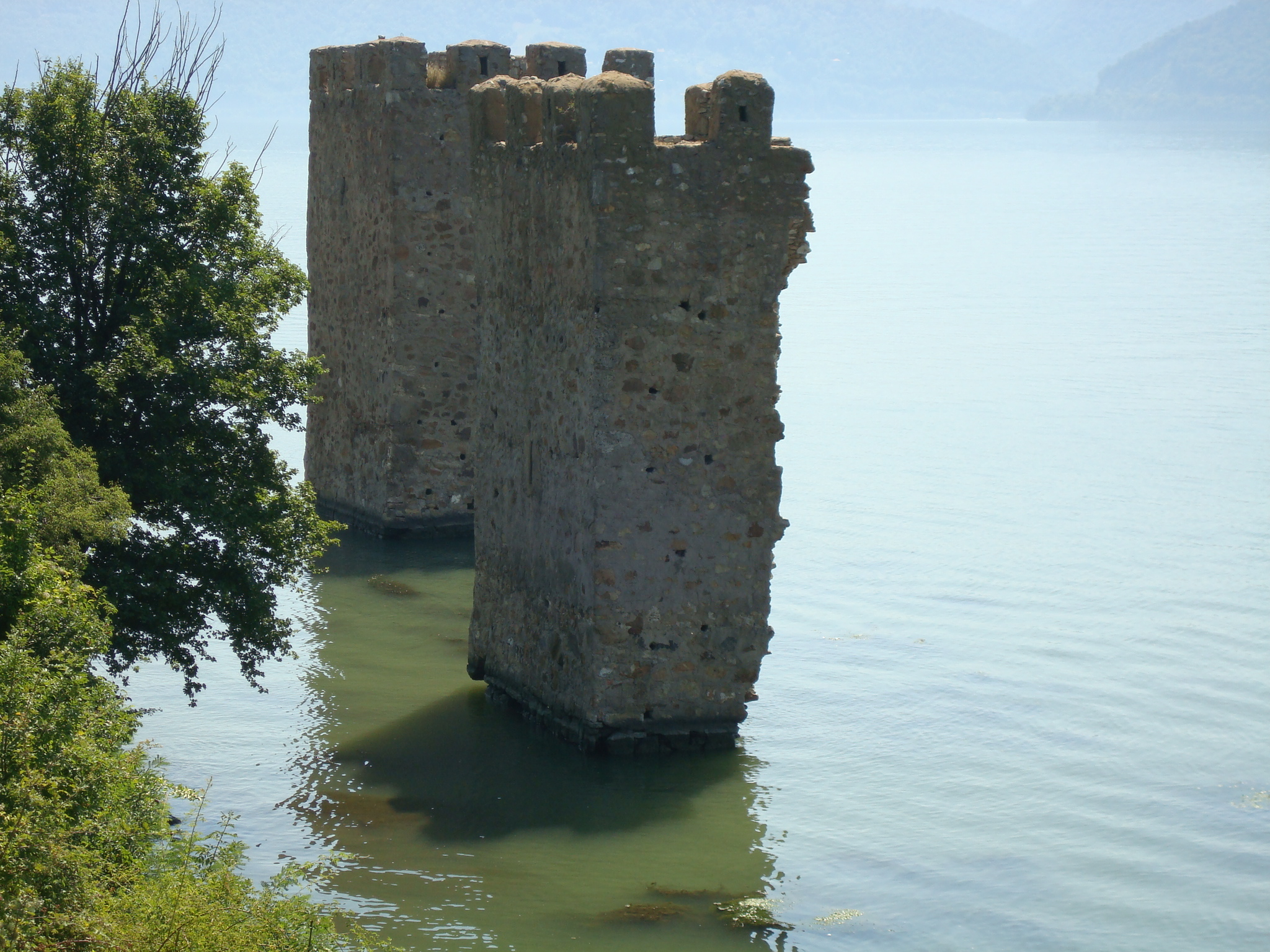 Ruine de construcții romane